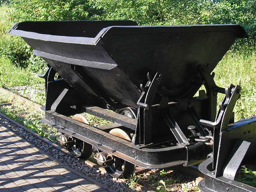 Ein Schüttgutwaggon des Schaubergwerkes "Volle Rose" bei Ilmenau (Thüringen).